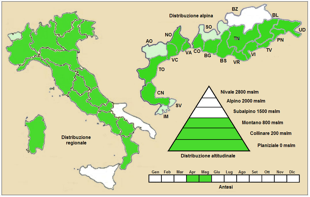 Arum maculatum - Distribuzione